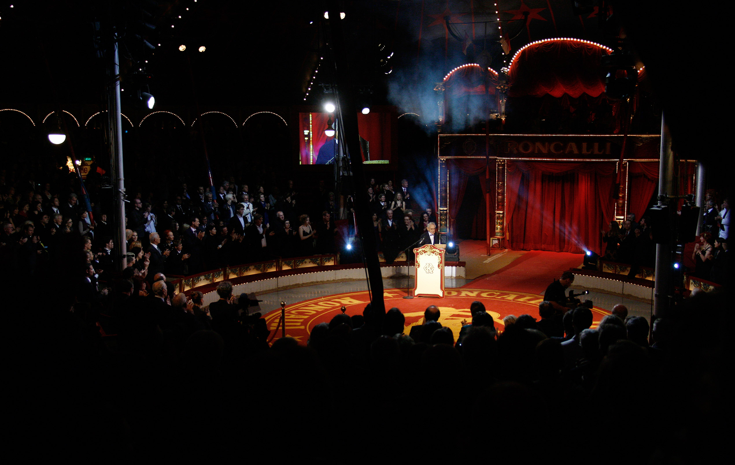 Standing ovations für den für sein Lebenswerk geehrten Schauspieler Otto Tausig während der Verleihung des Nestroy-Theaterpreises 2009 (Circus Roncalli auf dem Wiener Rathausplatz).